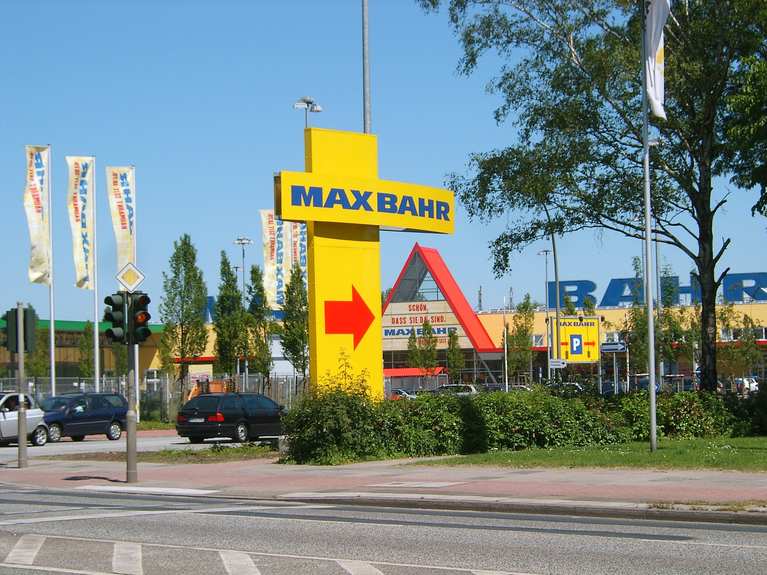 Hamburg, Bramfeld, Baumarkt Max Bahr.